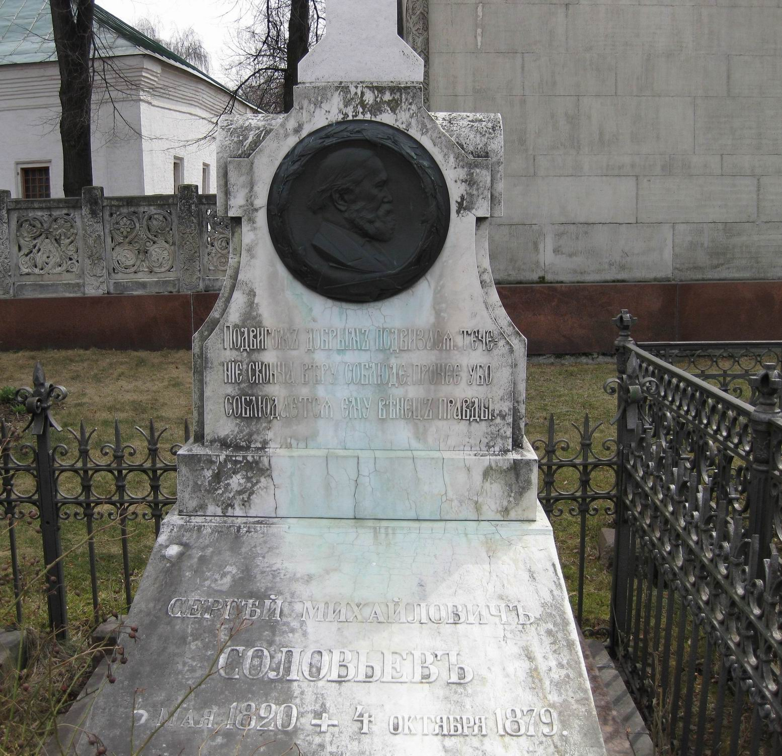 Фрагмент памятника историку Сергею Михайловичу Соловьеву в Новодевичьем монастыре